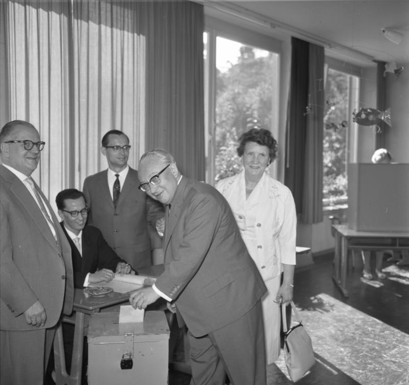 Bundestagswahl: Erich Ollenhauer bei der Stimmabgabe. (und andere Wähler)